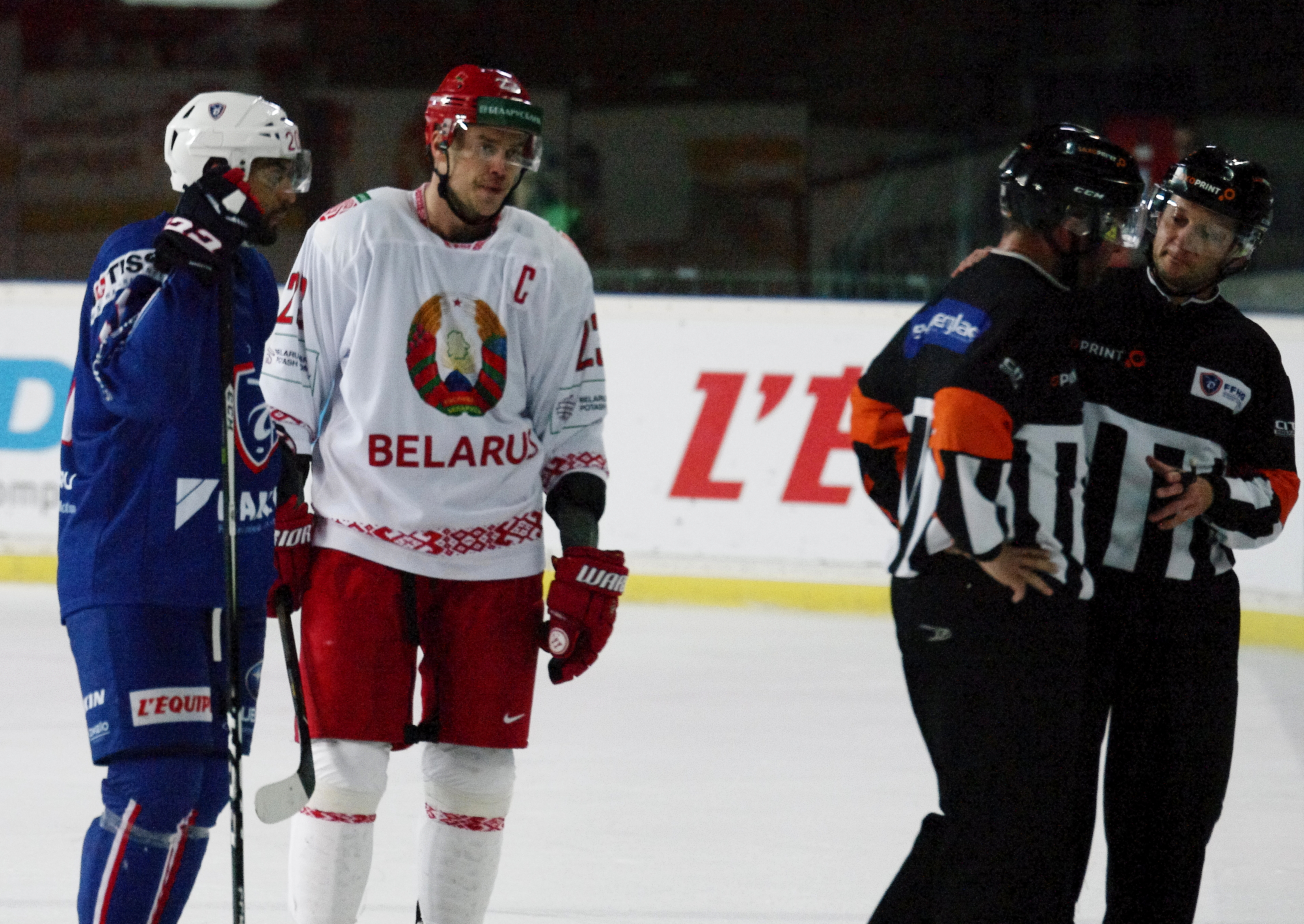 France vs. Biélorussie, 1er mai 2017